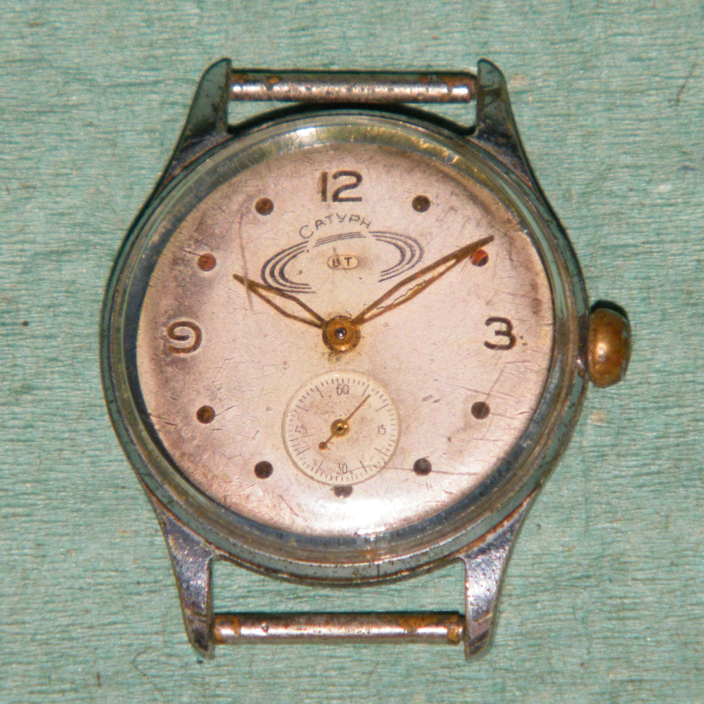 Часы "Сатурн" выпускались на Чистопольском часовом заводе в 1960-е годы.